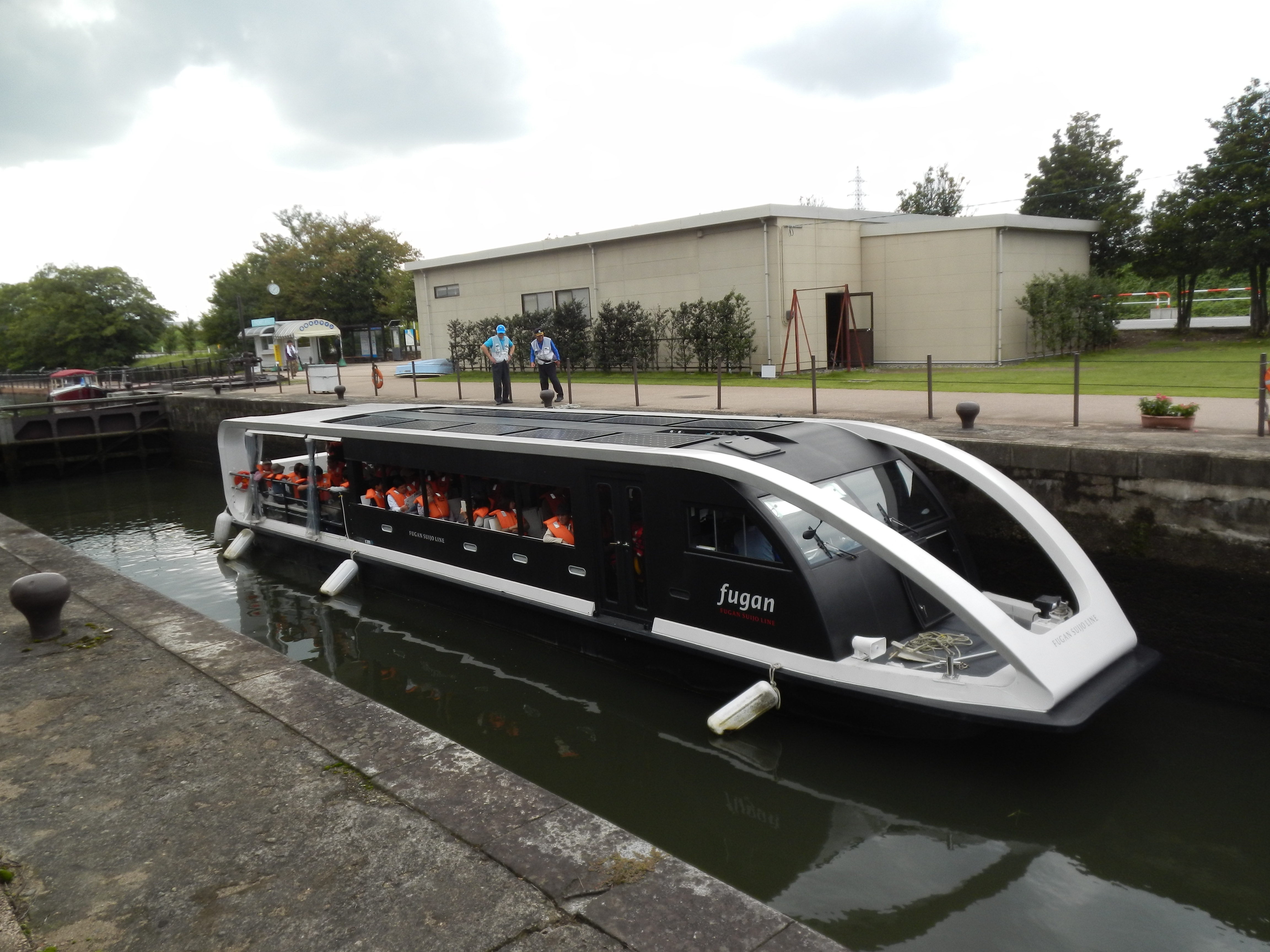 2 Kōjinmachi, Toyama-shi, Toyama-ken 930-0809, Japan